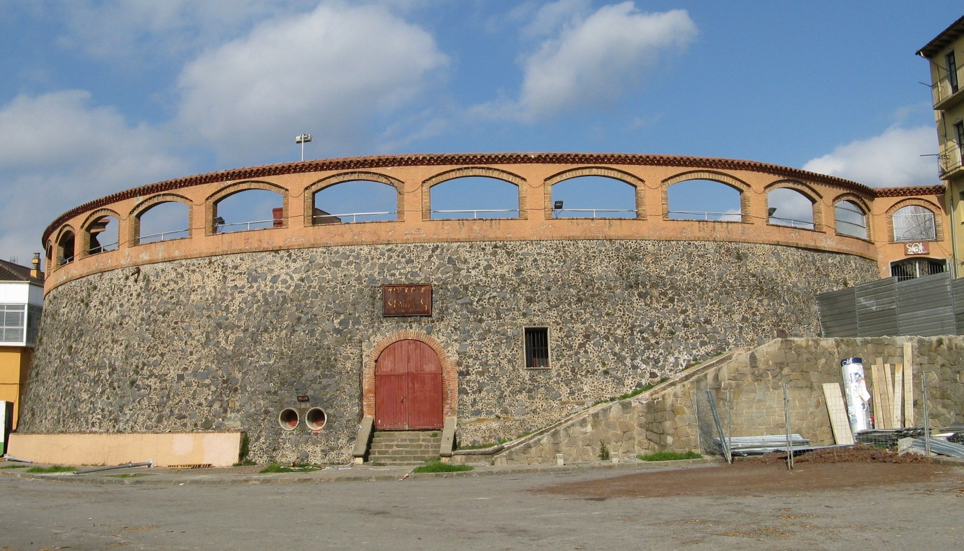 Bull fight arena at Olot (Catalunya, Spain)